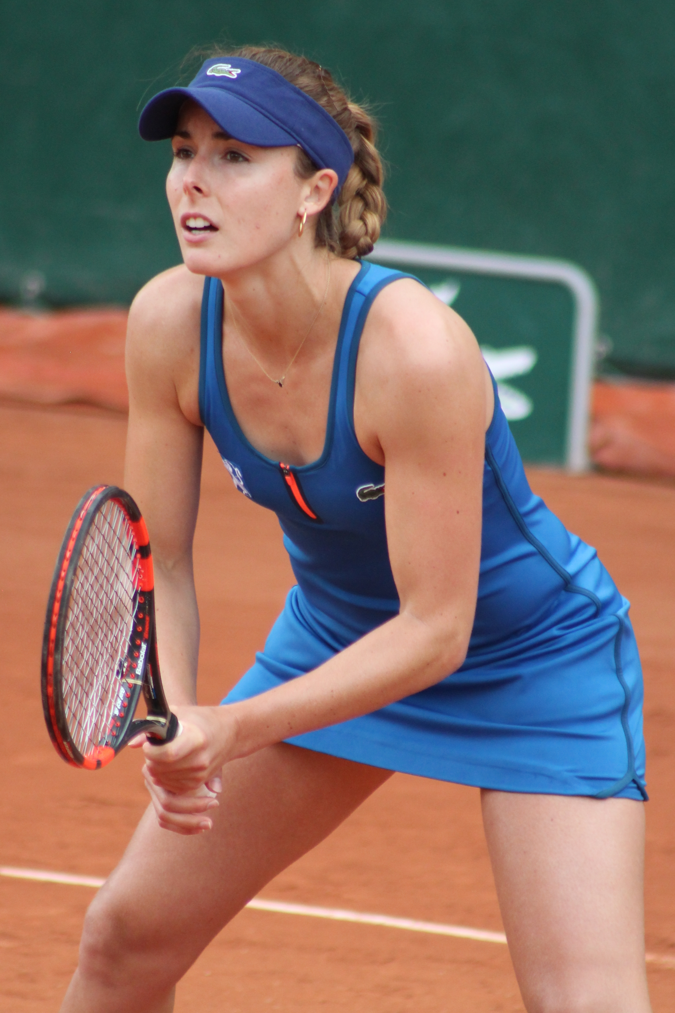 Cornet RG15 (8)